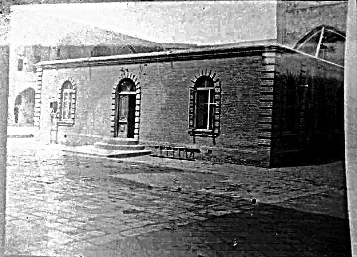 Постройка европеского стиля во дворе бухарского медресе Кукельдаш